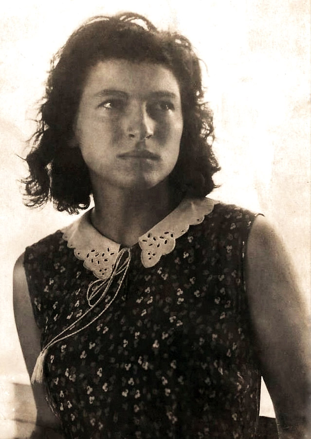 רחל לנדאו בצעירותה